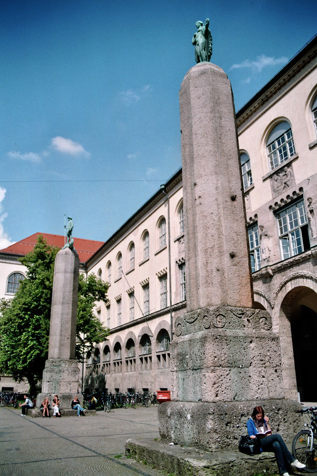 Ludwig-Maximilians-Universität München, Eingang Amalienstraße mit den beiden allegorischen Erzfiguren Sieg der Wissenschaft (links) und Wahrheit (rechts), von Hermann Hahn, 1907/10, gegossen von Wilhelm Rupp